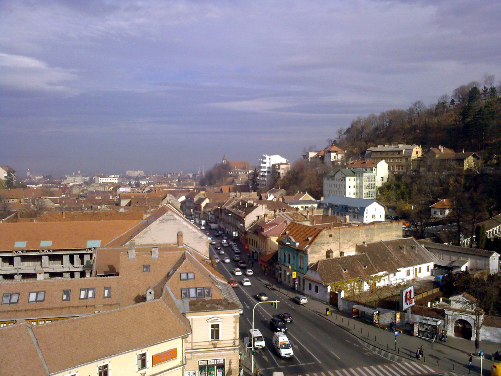 Rue Lungă, Braşov, Roumanie